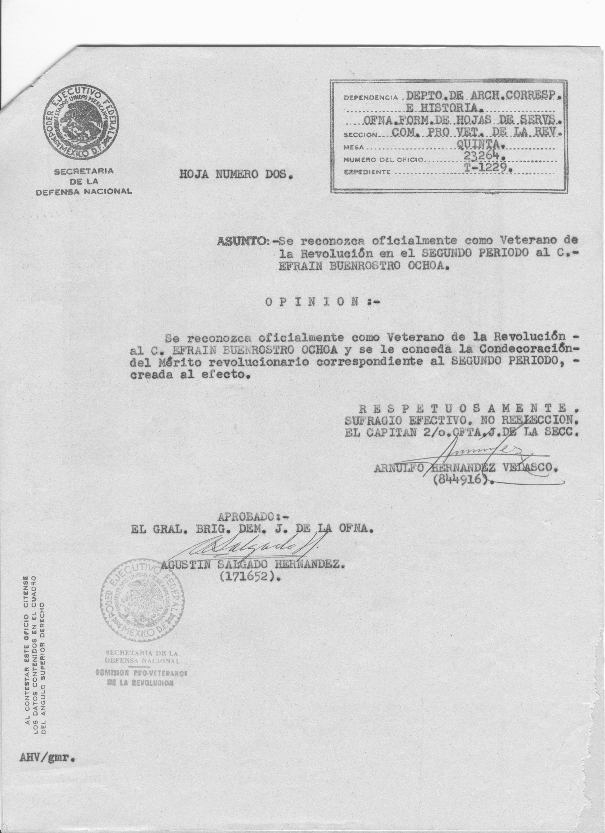 Se concede la medalla al merito de la revoluciónn a Efraín Buenrostro